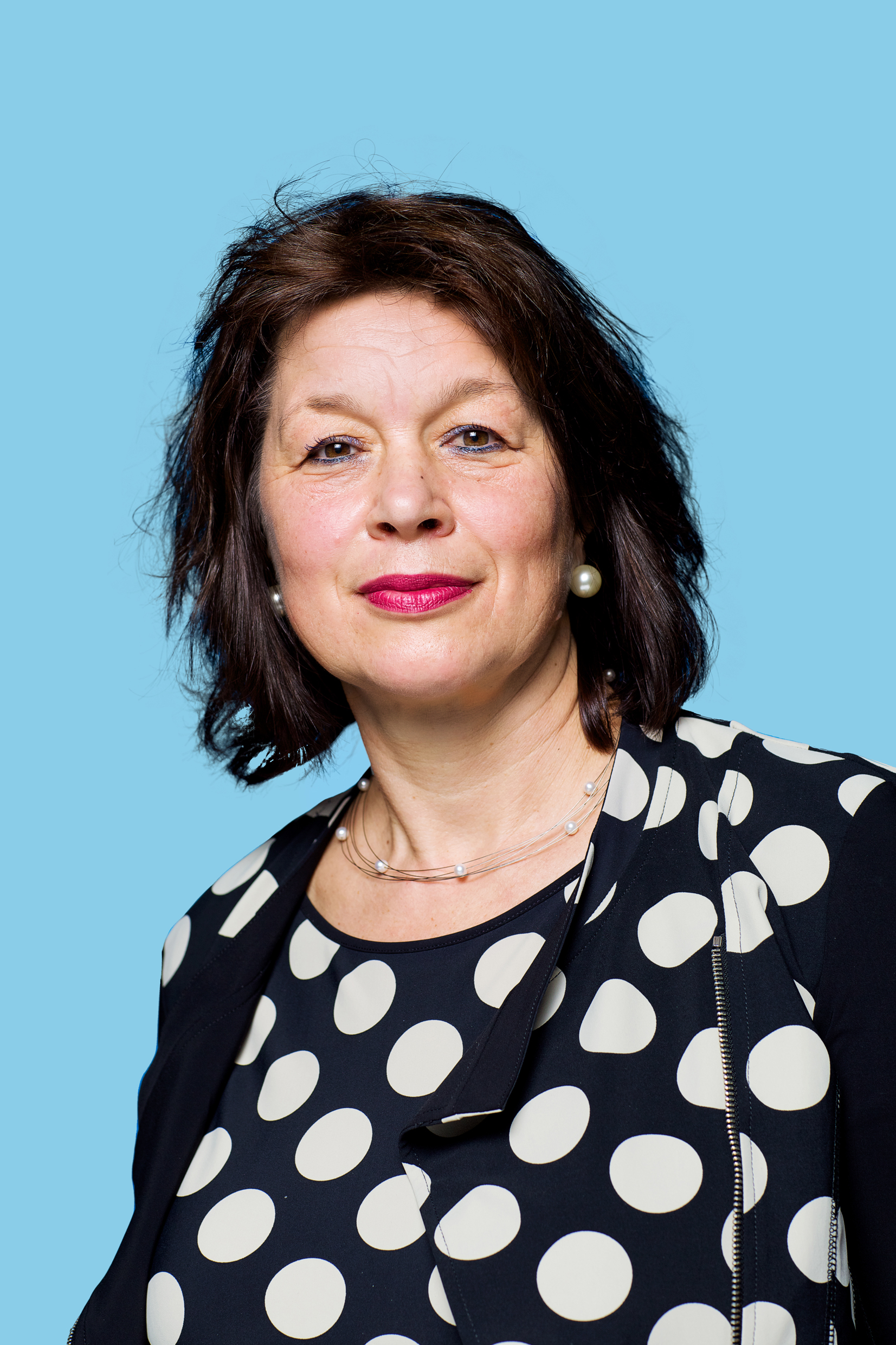 18 januari 2015. Kandidaat voor de Eerste Kamer. Op pvda.nl de volledige kandidatenlijst: bit.ly/1zpNRIG. Foto Lex Draijer.